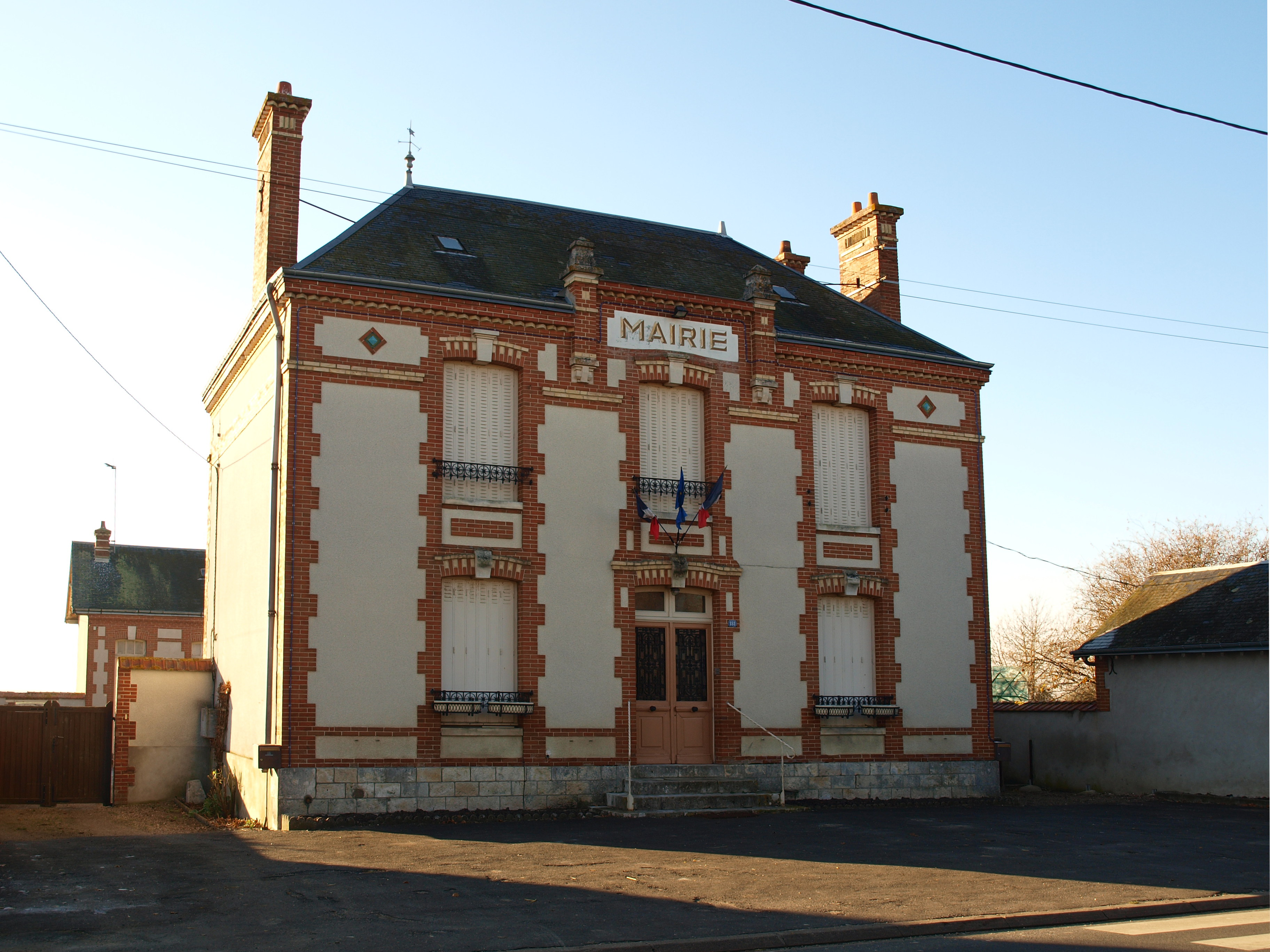 Gémigny (Loiret, France) ; mairie